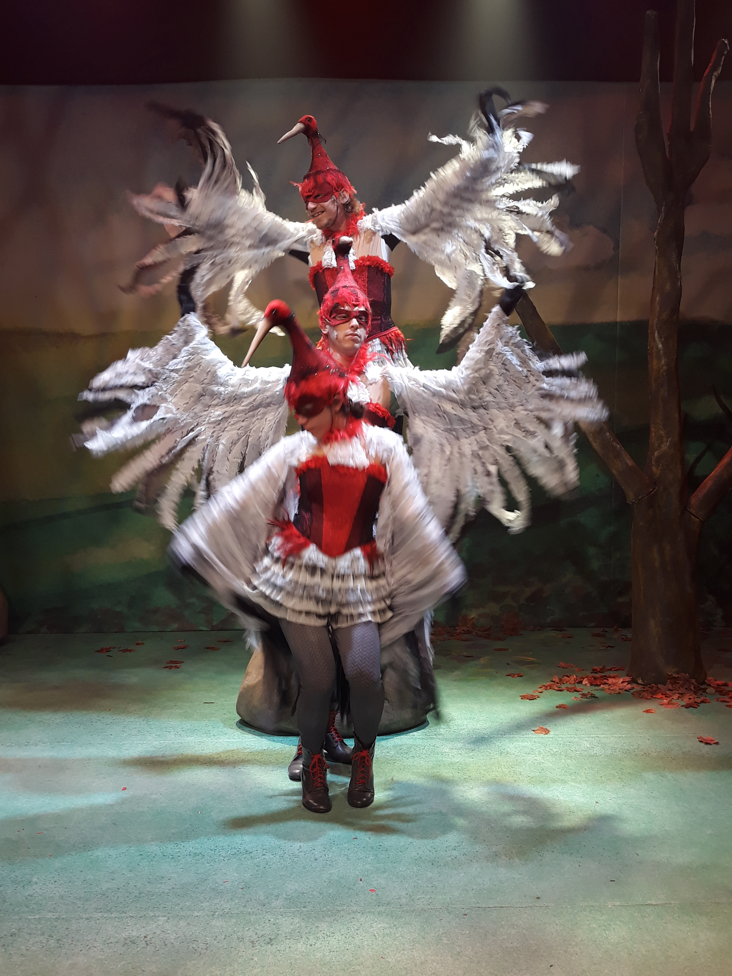 תיאטרון ילדים והנוער באר שבע 2018 מאת: תמר לוין בימוי: רפי ניב